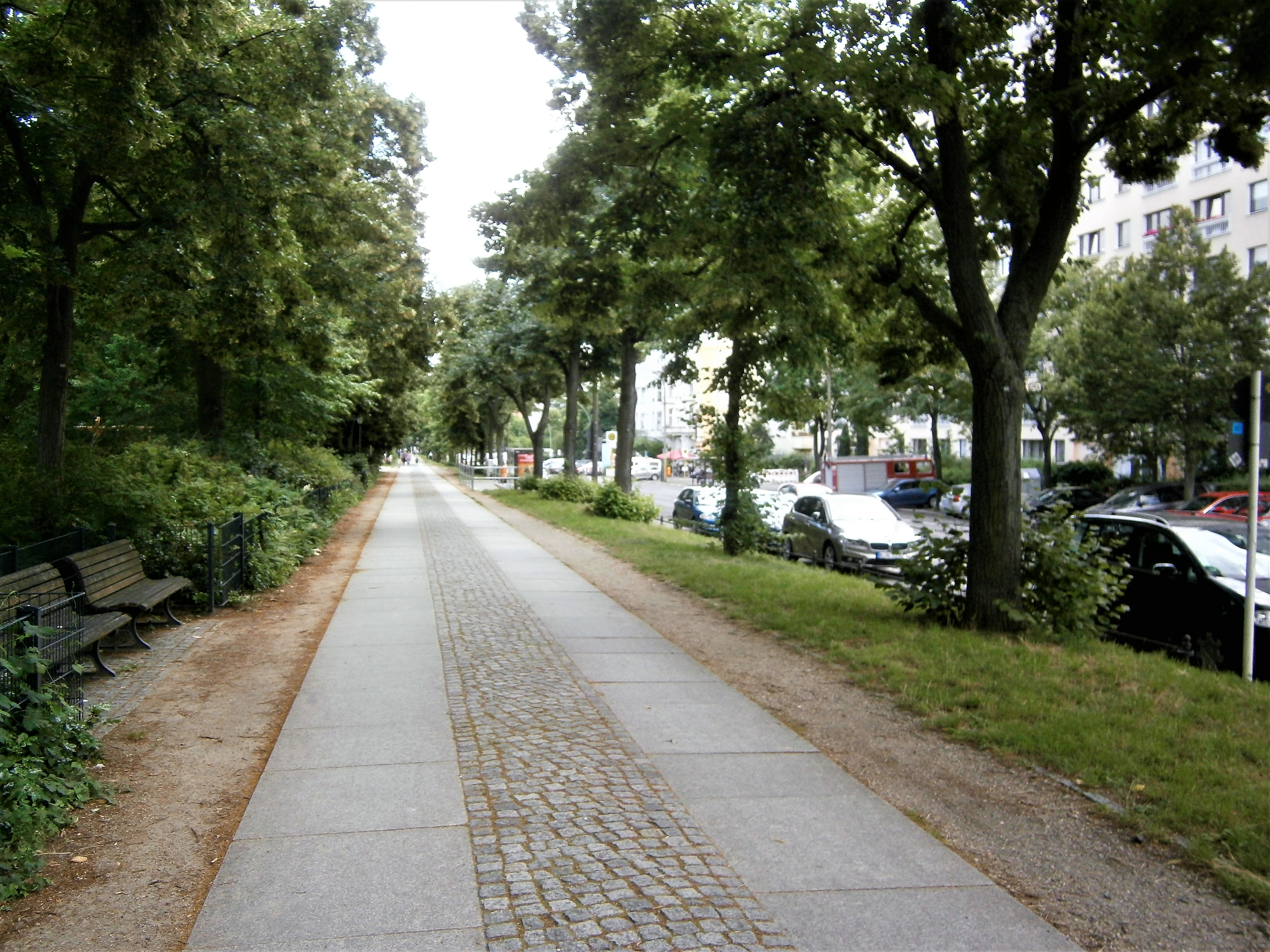 Die Friedenstraße ist eine Straße im Berliner Bezirk Friedrichshain-Kreuzberg, Ortsteil Friedrichshain. Angelegt und benannt wurde sie 1871-1876 auf dem Communicationsweg außerhalb der abgerissenen Berliner Zollmauer. Bereits seit dem Anlegen und der Bebauung bestand eine Teilung der Straße auf Königstadt und Stralauer Viertel. Aktuell sind es drei unterschiedene Straßenabschnitte: regionale Straßenverbindung im Barnimkiez am Volkspark Friedrichshain, am Platz der Vereinten Nationen als Parkzone, südlich im (Planungsraum) "Friedenstraße" als Ergänzungsstraße. Das Bild zeigt den Randweg am Volkspark Friedrichshain parallel entlang der Friedenstraße.